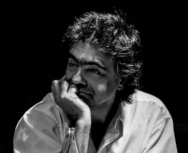 El filosofo y escritor argentino Diego Tatián en la presentación de un libro.